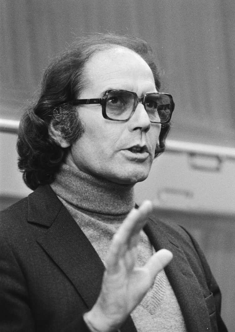 Adolfo Pérez Esquivel, Nobelprijswinnaar voor de vrede in 1980 geeft een lezing in de VU in Amsterdam